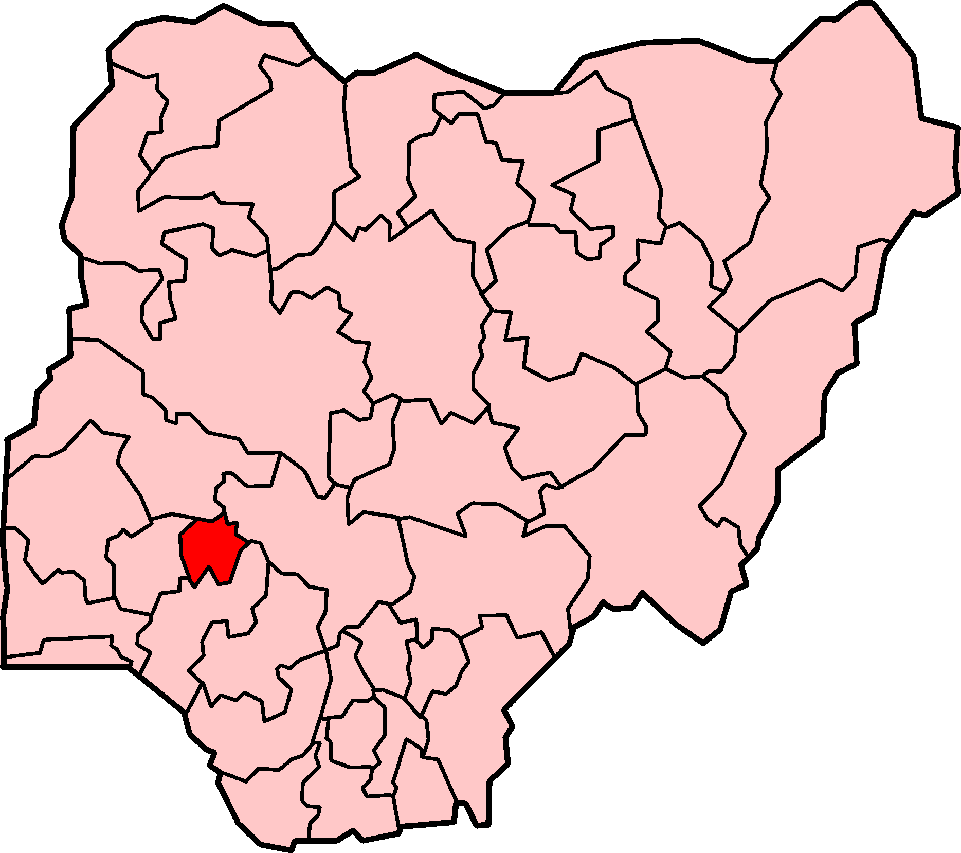 Localização de Ekiti na Nigéria.